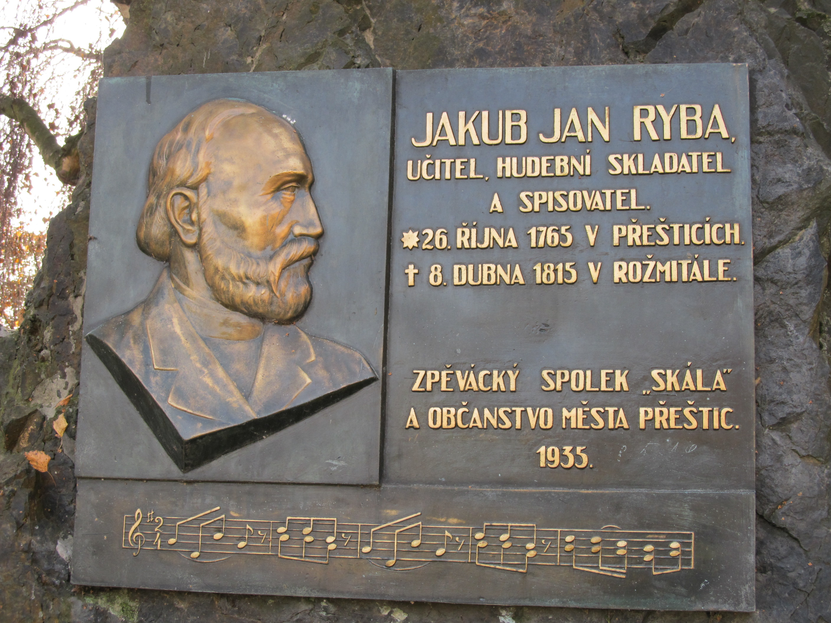 Přeštice - pomník Jakuba Jana Ryby - detail